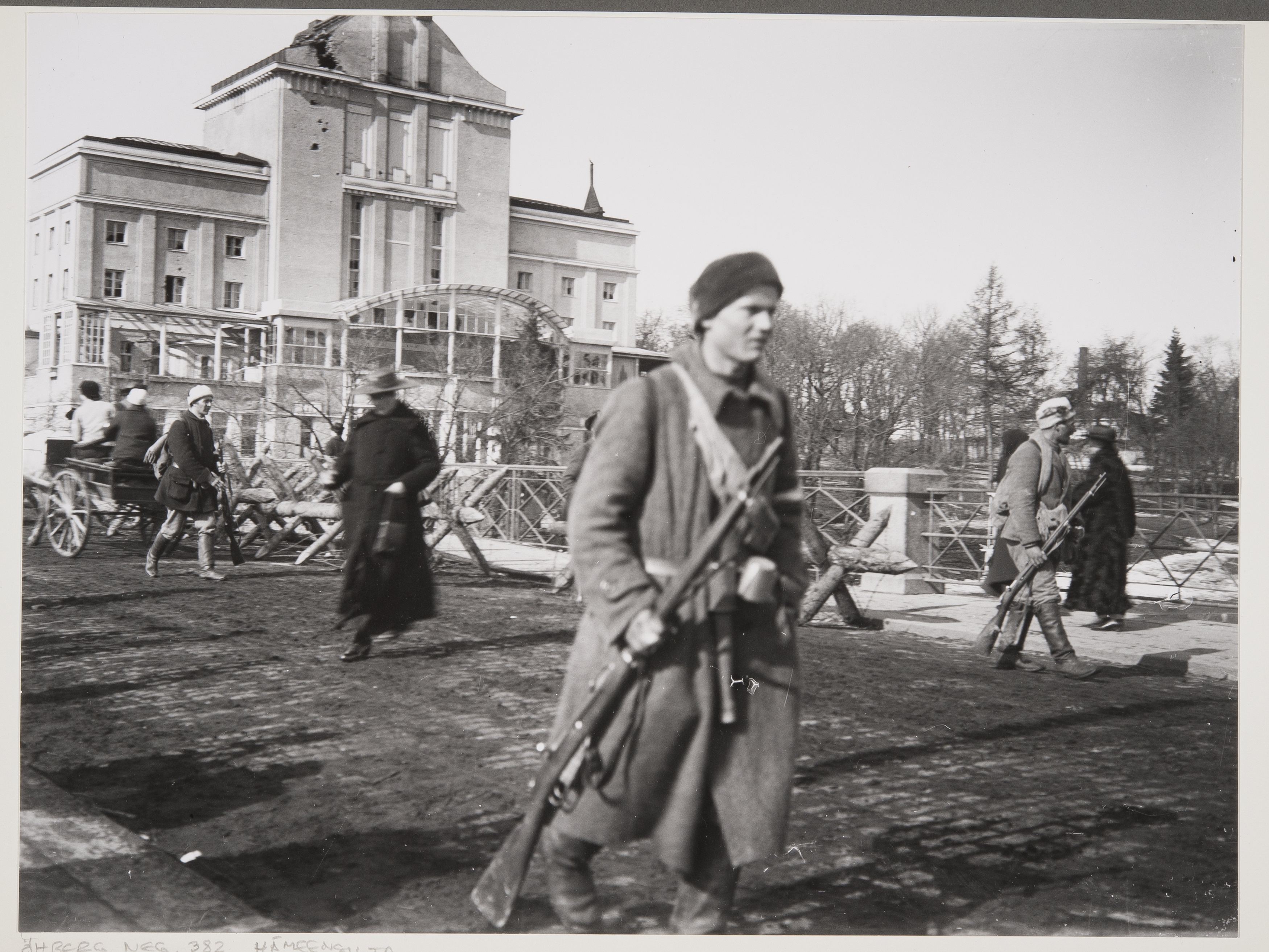 Näkymä Hämeensillalta Tampereen taistelujen aikaan huhtikuussa 1918